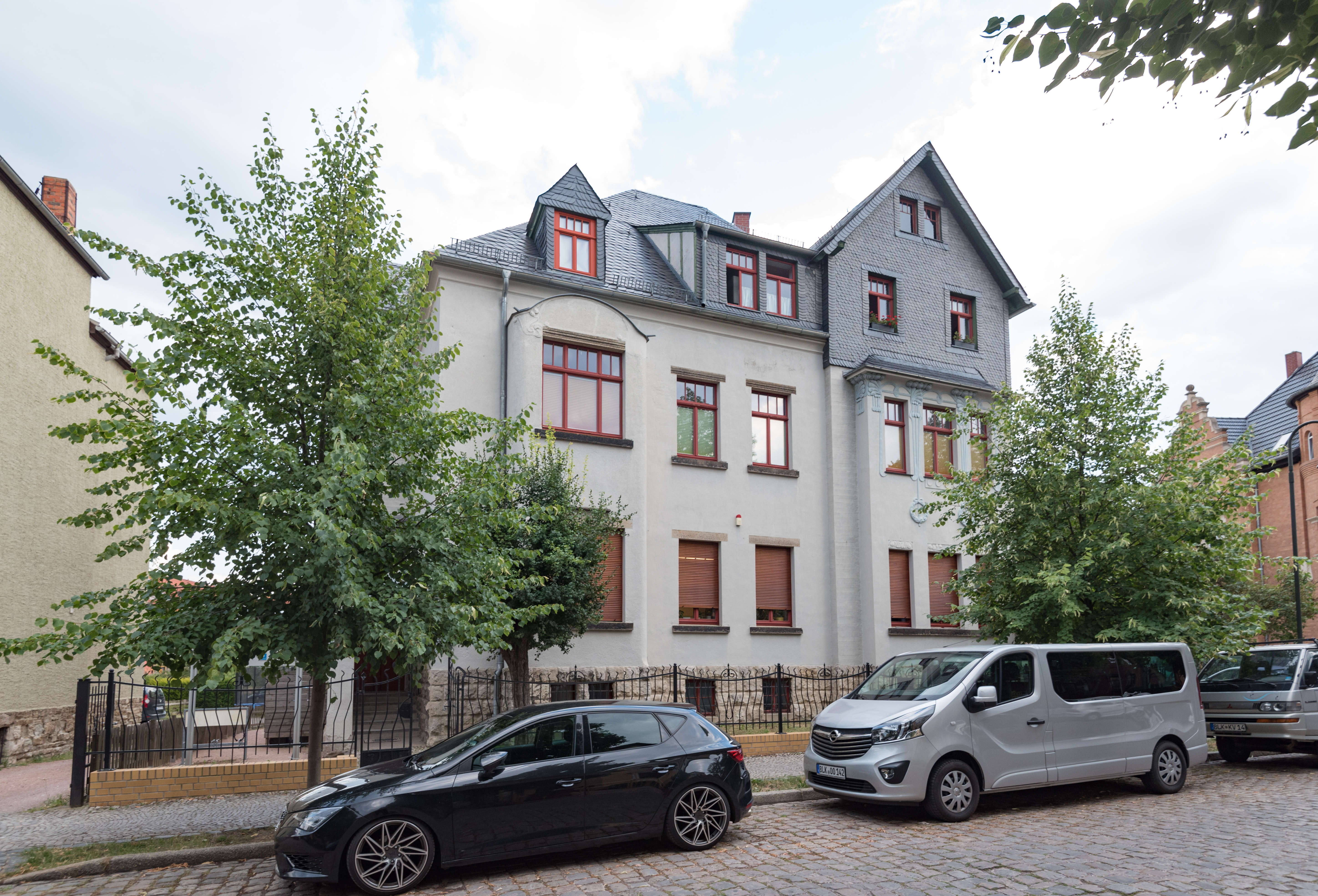 Naumburg (Saale), Buchholzstraße 4